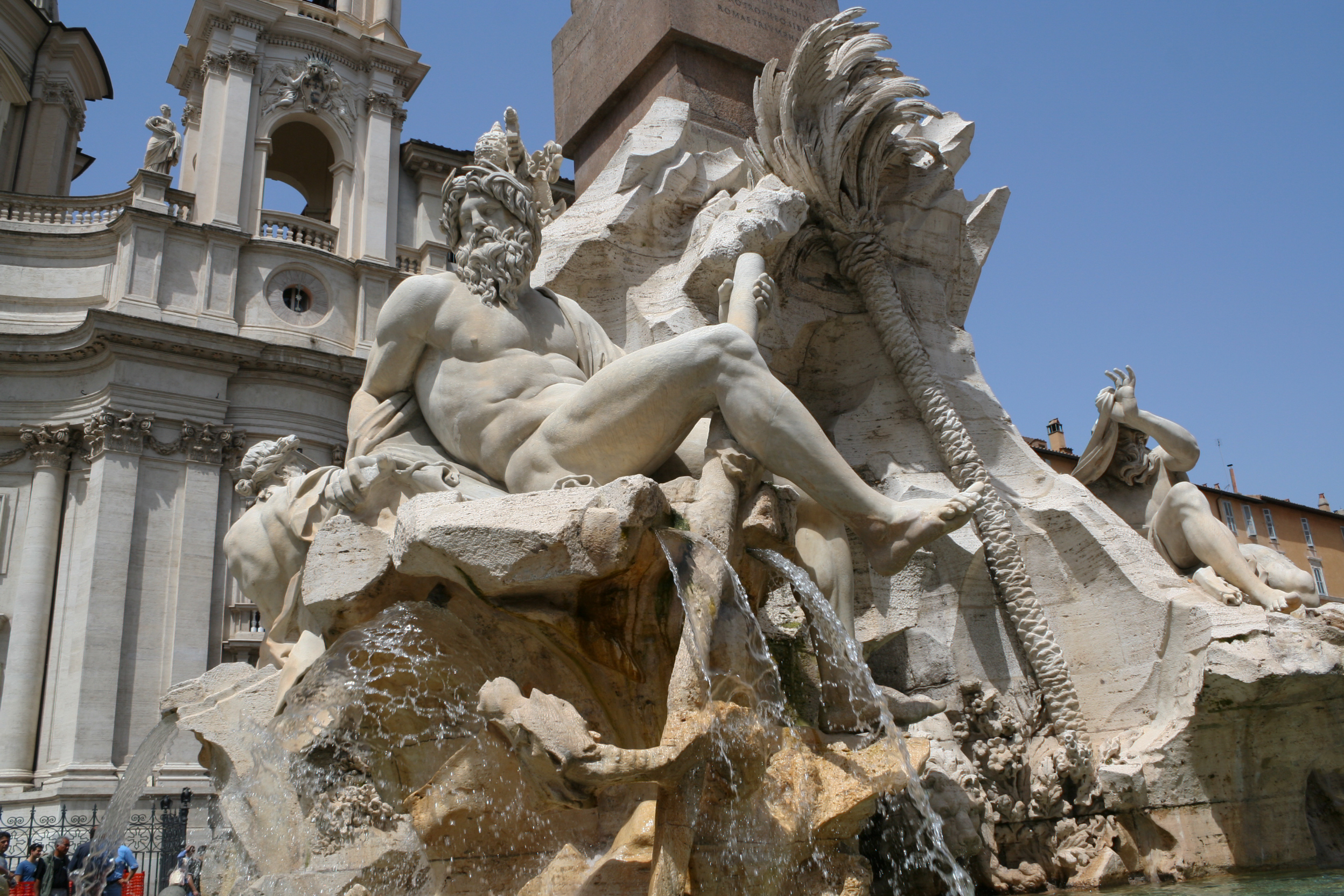 Der größte Brunnen im Zentrum von Piazza Navona ist der Brunnen der 4 Flüsse, ein Werk Gian Lorenzo Berninis mit dem Obelisk in der Mitte. Papst Innozenz X gab 1651 den Brunnen in Auftrag. Es wird berichtet, dass Gian Lorenzo Bernini ein Modell des Brunnens in Silber, ca. 1,5 m hoch, der Schwägerin des Papstes Donna Olimpia Maidalchini schenkte, die ihrerseits den Papst Giovanni Battista Pamphilj überzeugte, den Auftrag Bernini zu übertragen. Rom / Italien